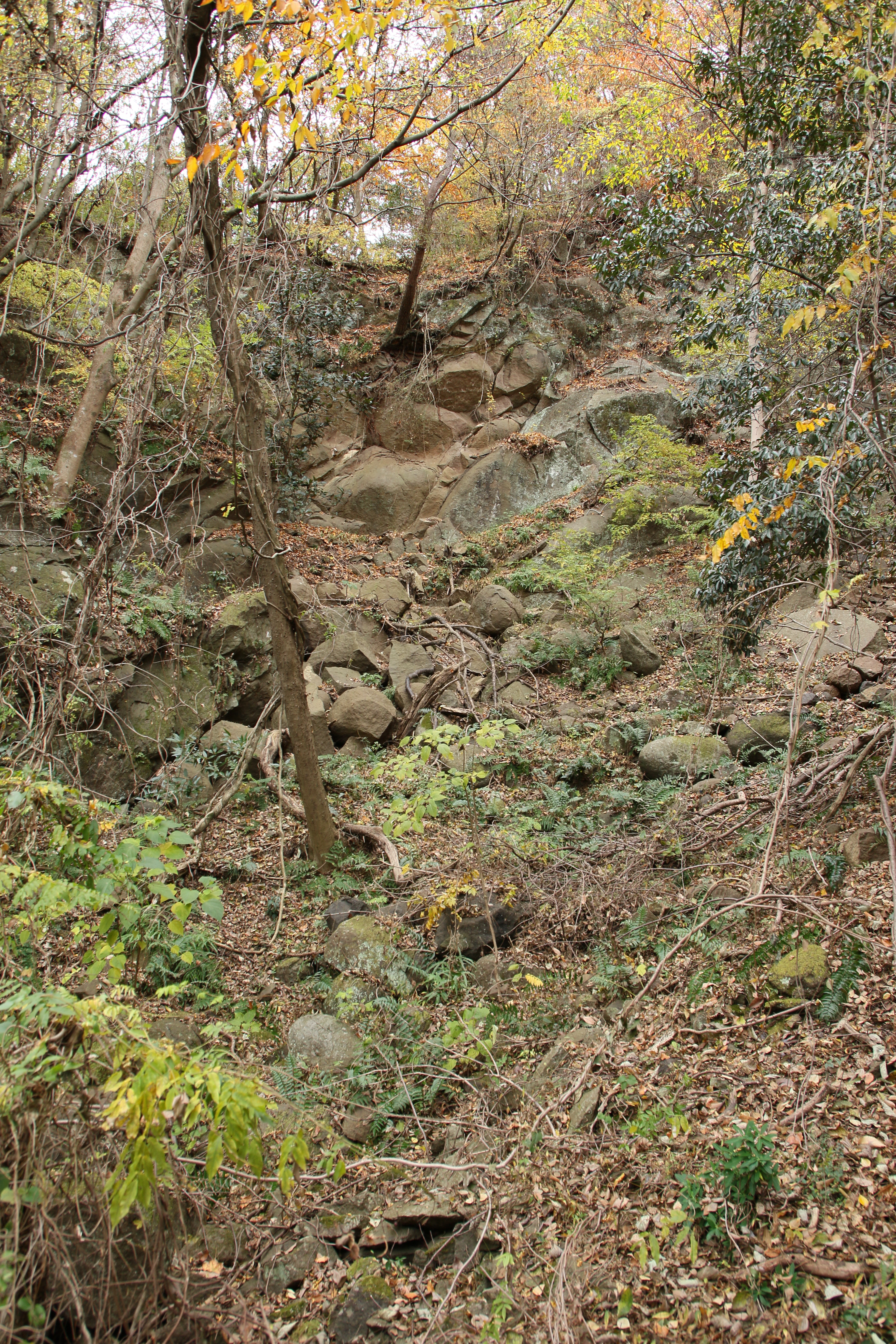 丸山（326m）下の日向石丁場 Canon EOS 7D Mark II